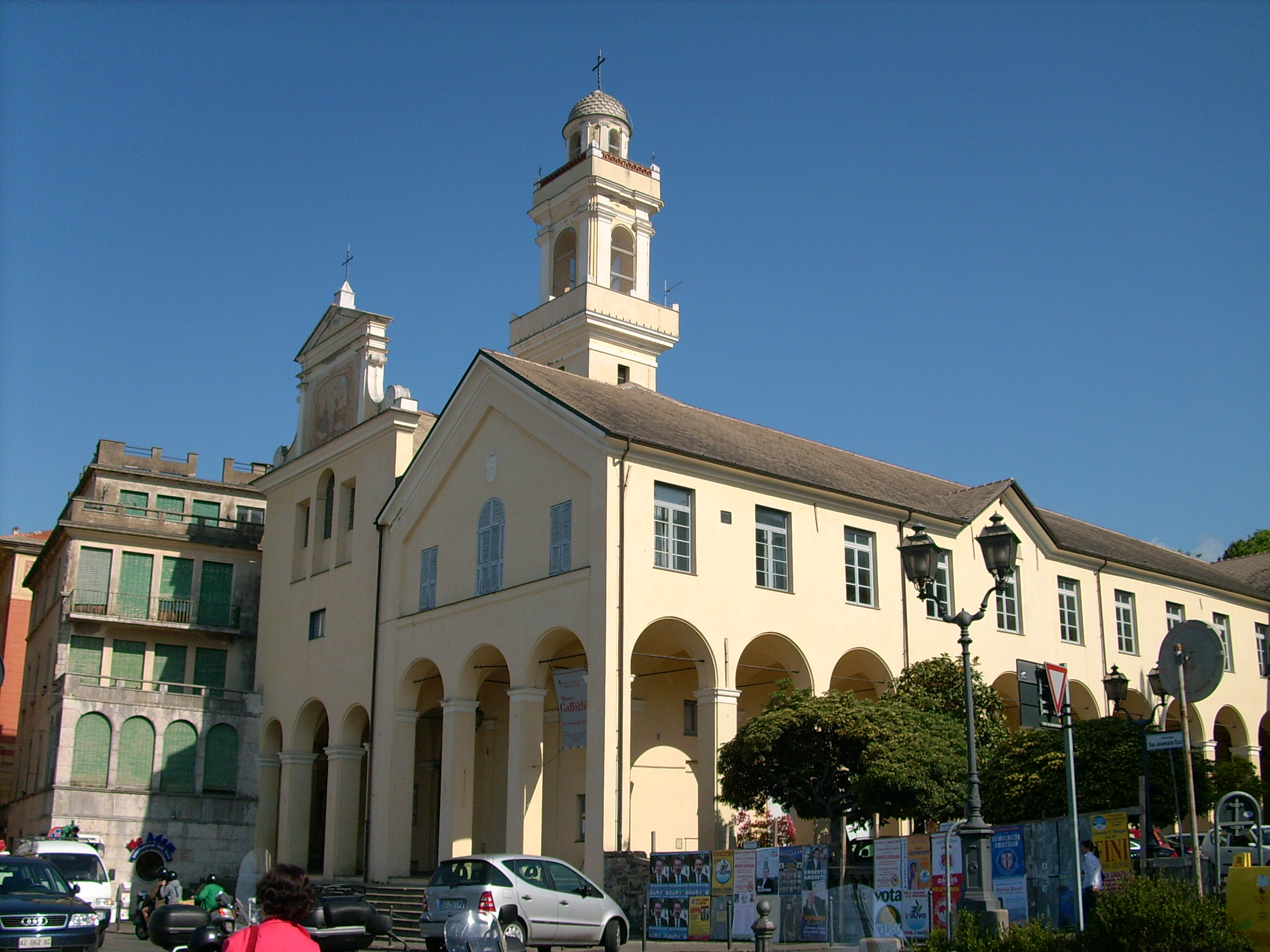 Auditorium delle Clarisse di Rapallo, Liguria, Italia